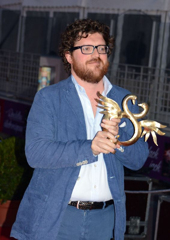 Duccio Chiarini au festival du film de Cabourg